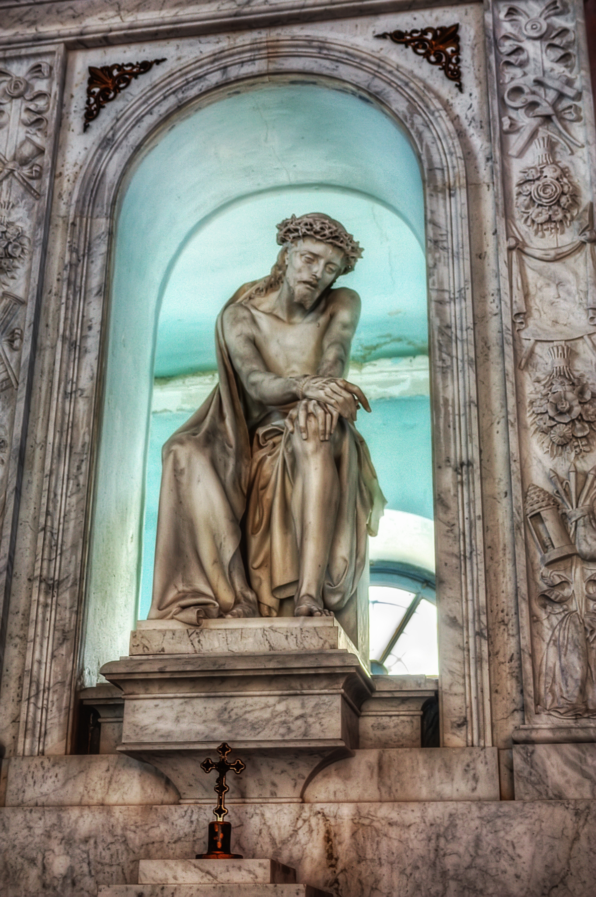 Oratorio San Felice This is a photo of a monument which is part of cultural heritage of Italy.